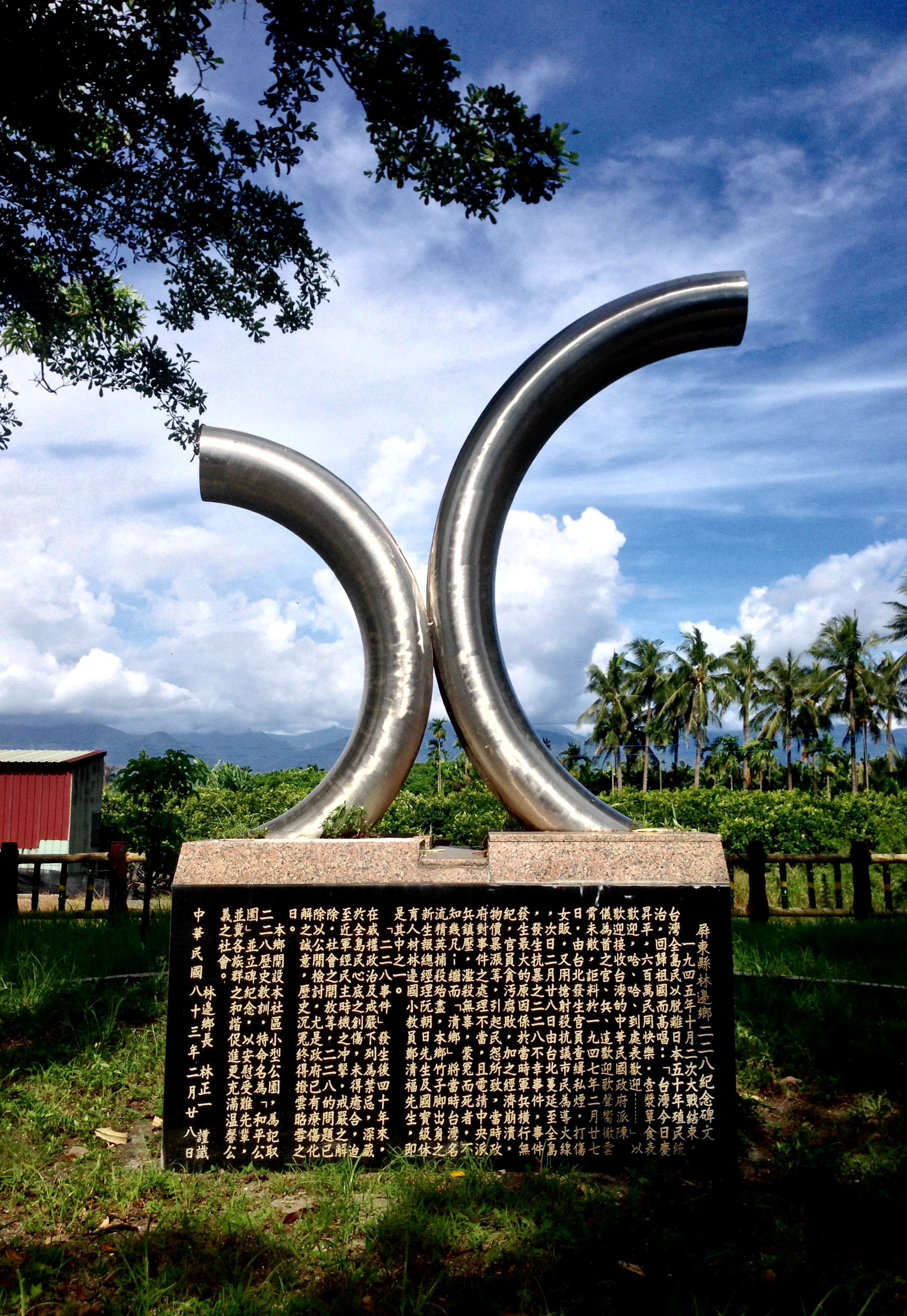 中文（台灣）: 臺灣屏東縣林邊鄉二二八紀念碑